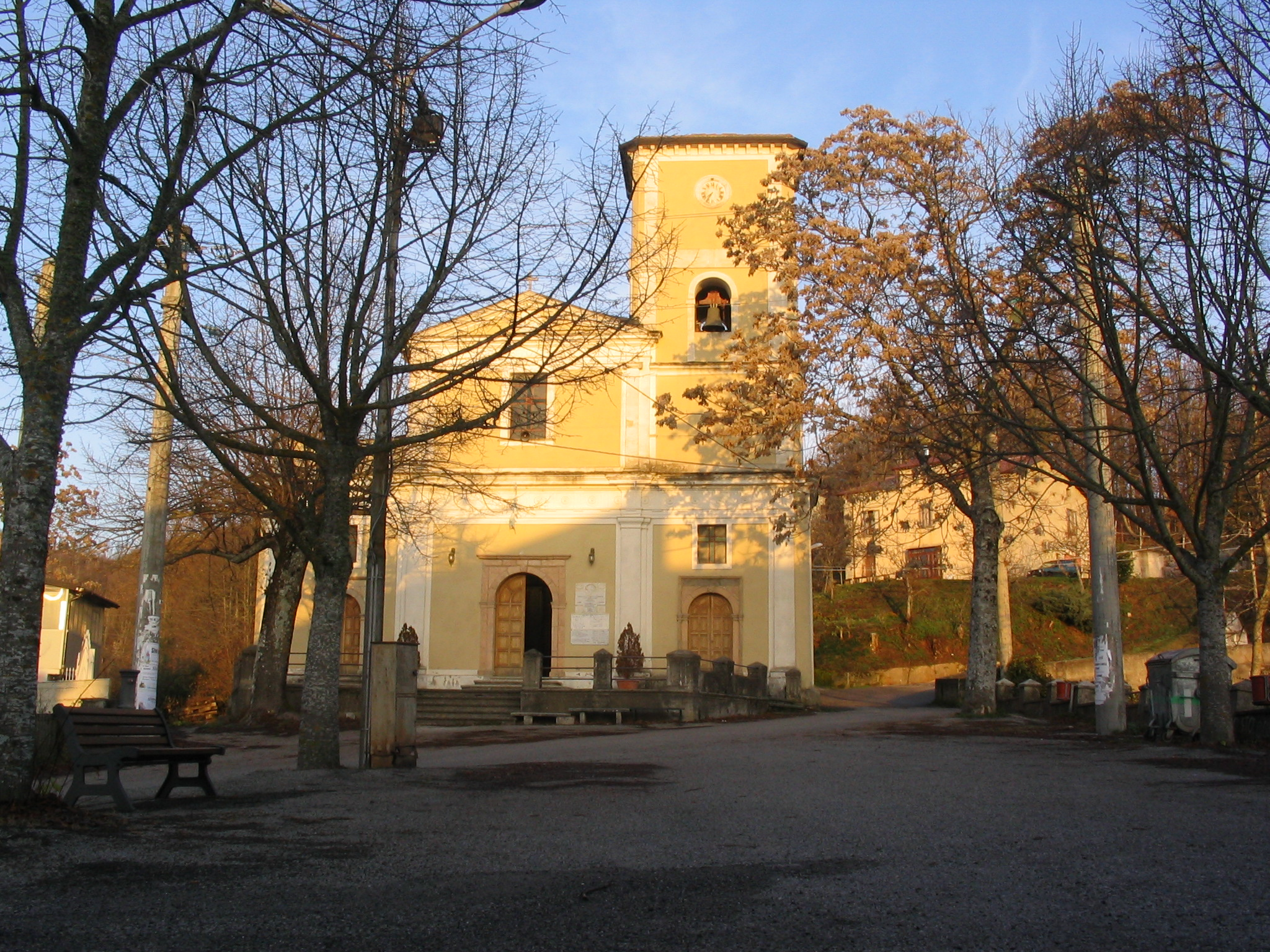 Adami, Madonna del Carmine Church